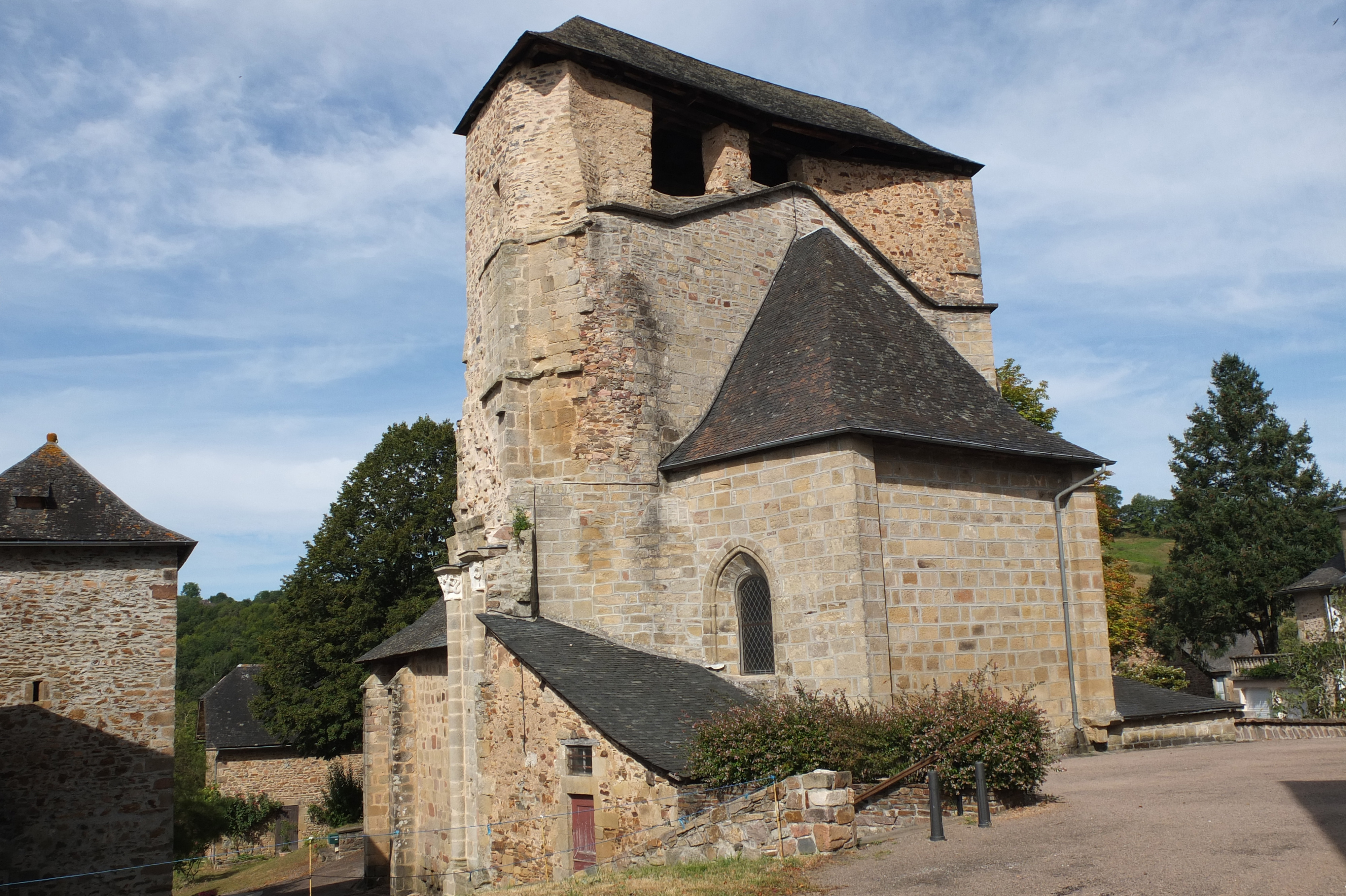 Église Notre-Dame d'Albignac, (ClasséInscrit, 19721972) This building is en partie classé, en partie inscrit au titre des Monuments Historiques. .